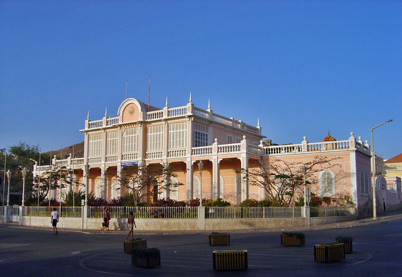 Palácio, Mindelo, São Vicente, Cabo Verde (tirada com Sony Cybershot DSC-P92)